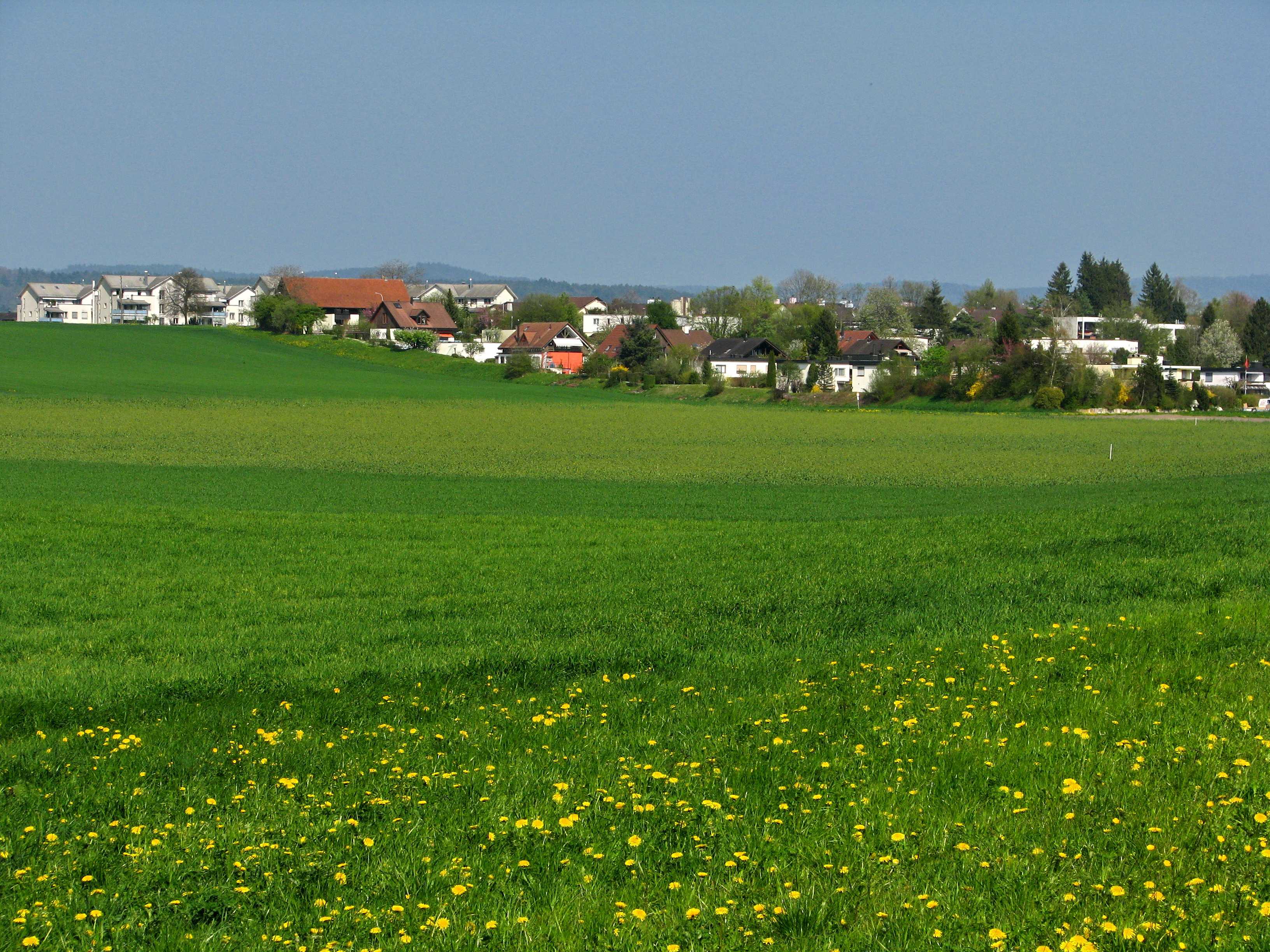 Schwerzenbach as seen from Glatt river